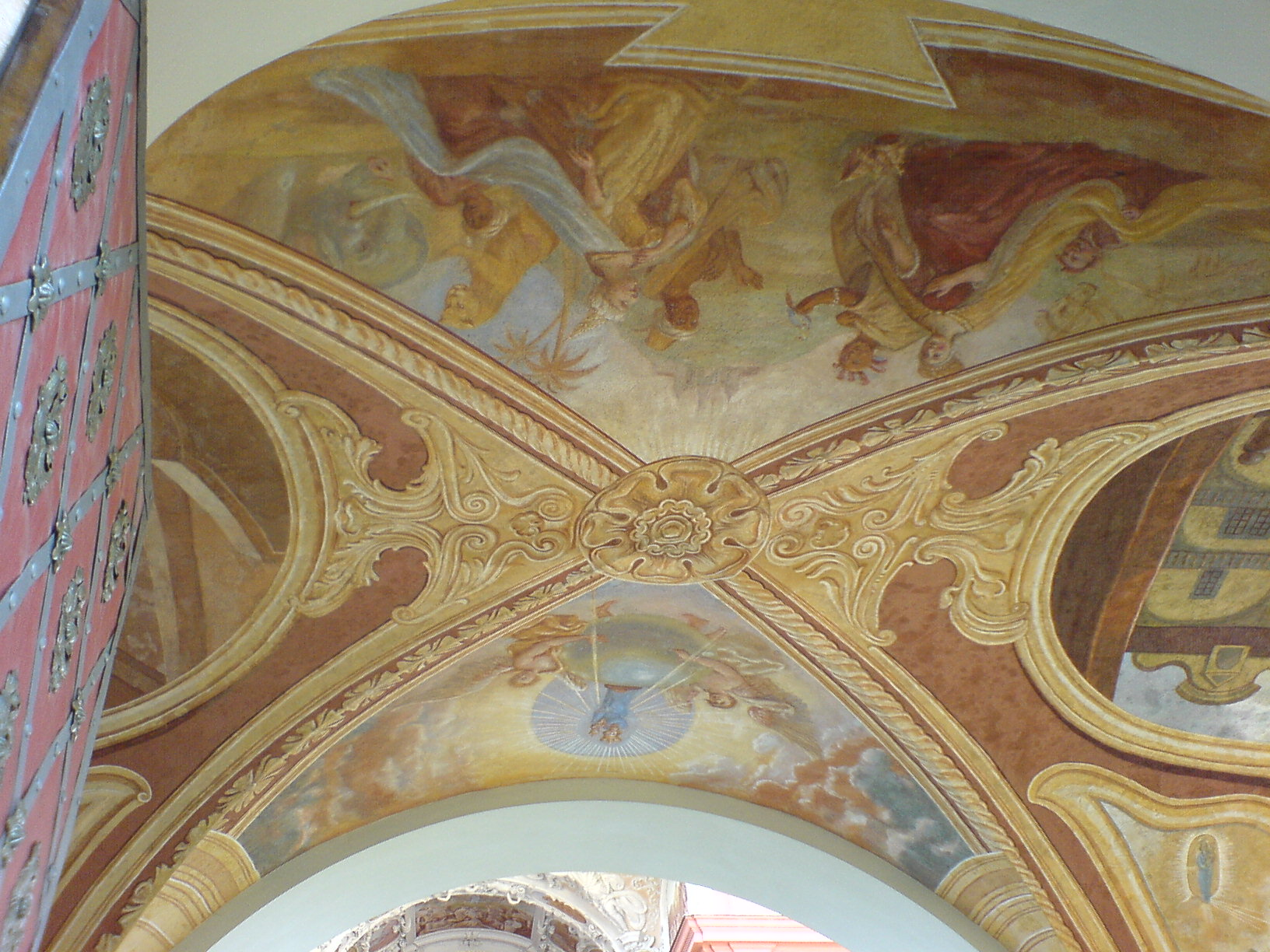 svata hora